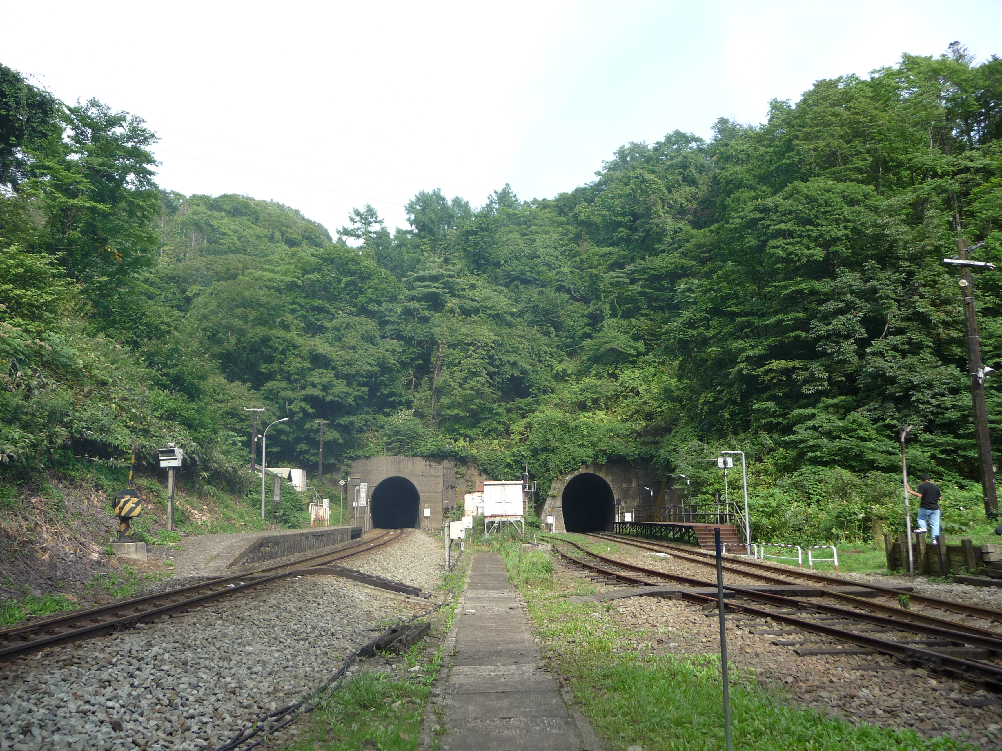 小幌駅全景